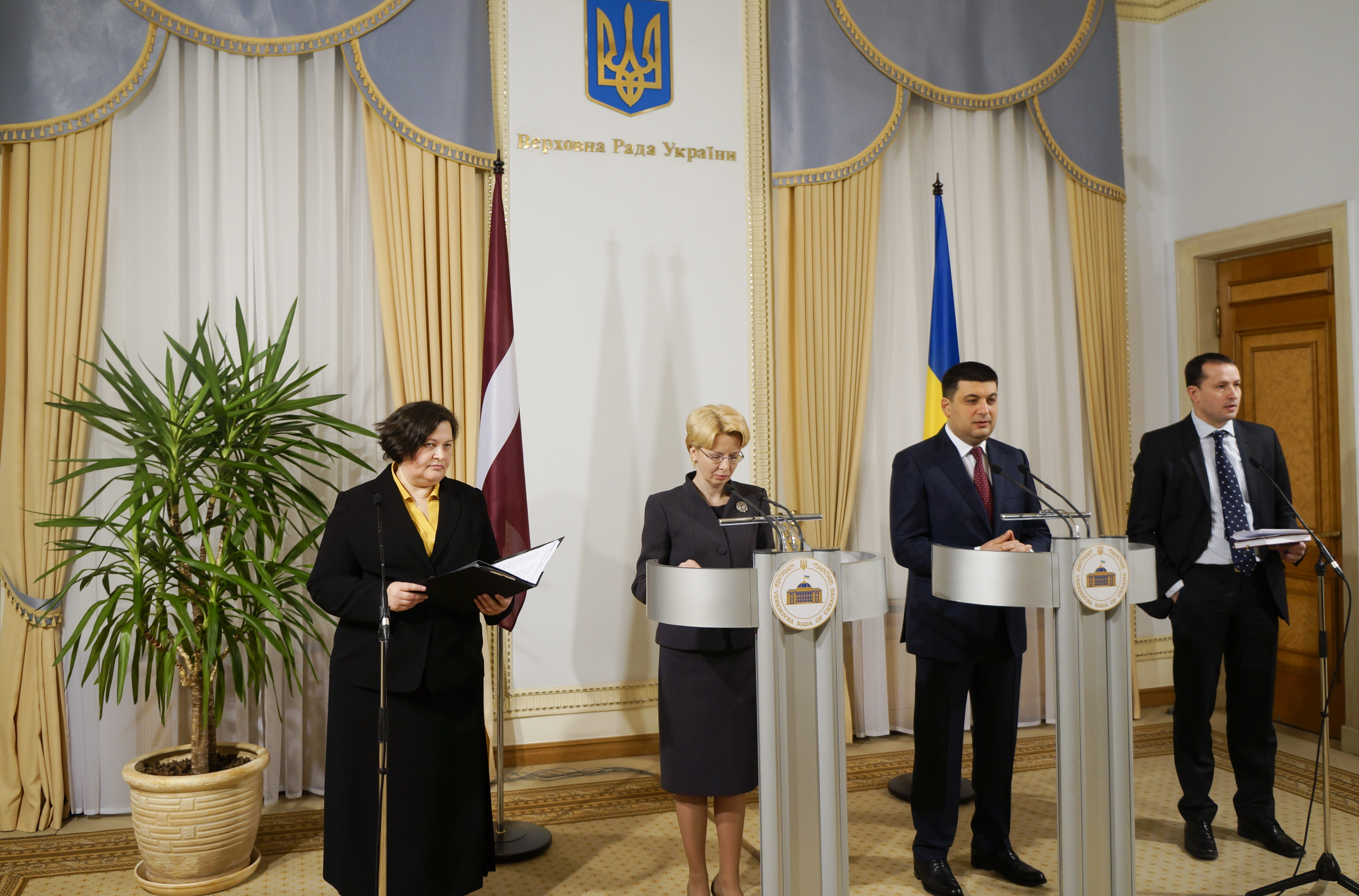 2015.gada 13.februāris. Saeimas priekšsēdētājas Ināras Mūrnieces un Ukrainas parlamenta priekšsēdētāja Volodimira Grojsmana preses konference pēc tikšanās Augstākajā Radā. Foto: Saeimas Kanceleja Izmantošanas noteikumi: saeima.lv/lv/autortiesibas